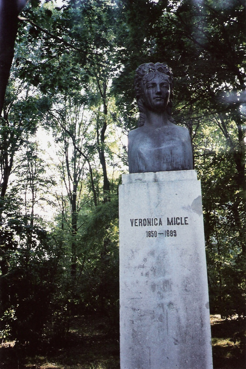 Statue of Veronica Micle, Iaşi, Romania